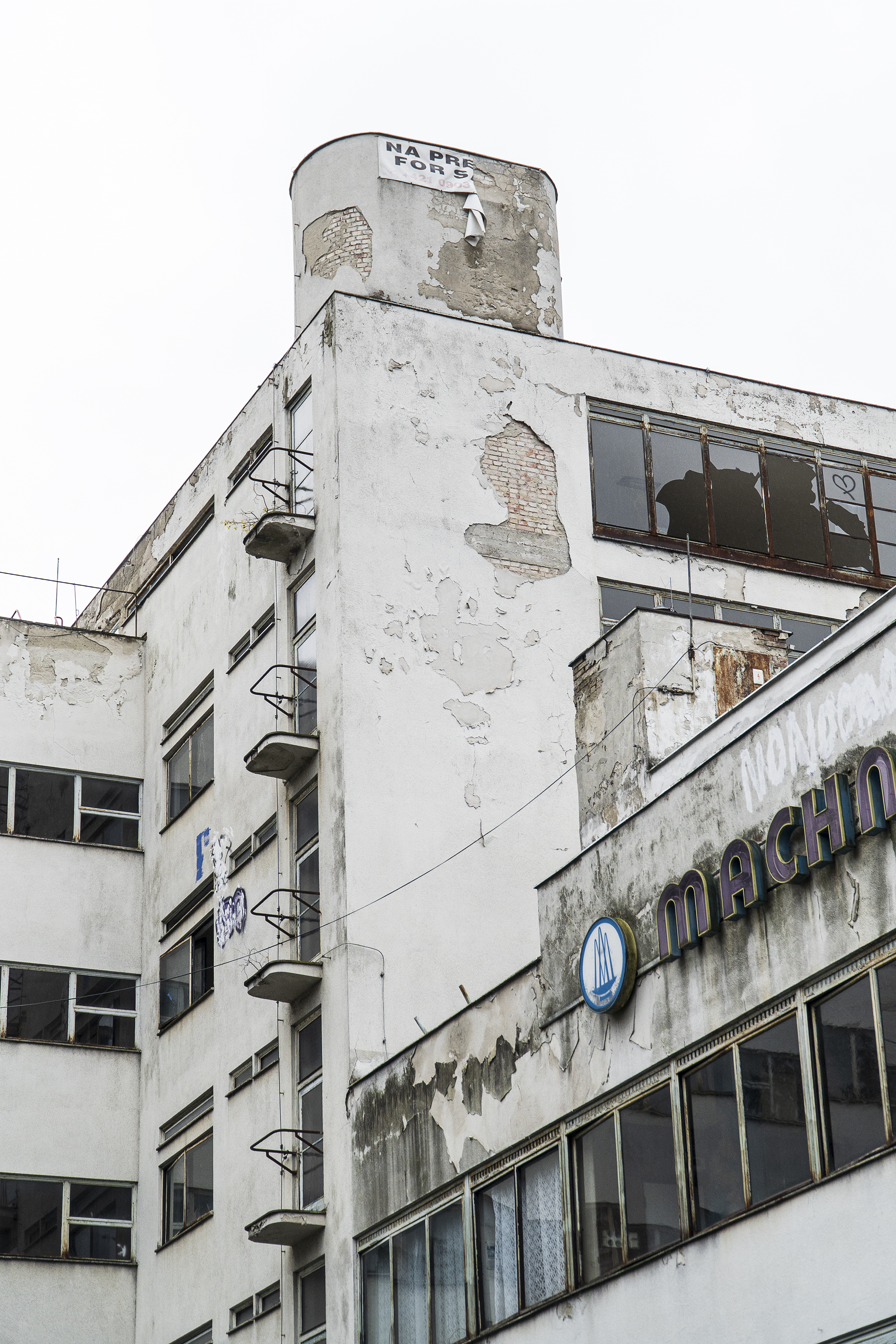 Liečebný dom Machnáč v Trenčianskych Tepliciach